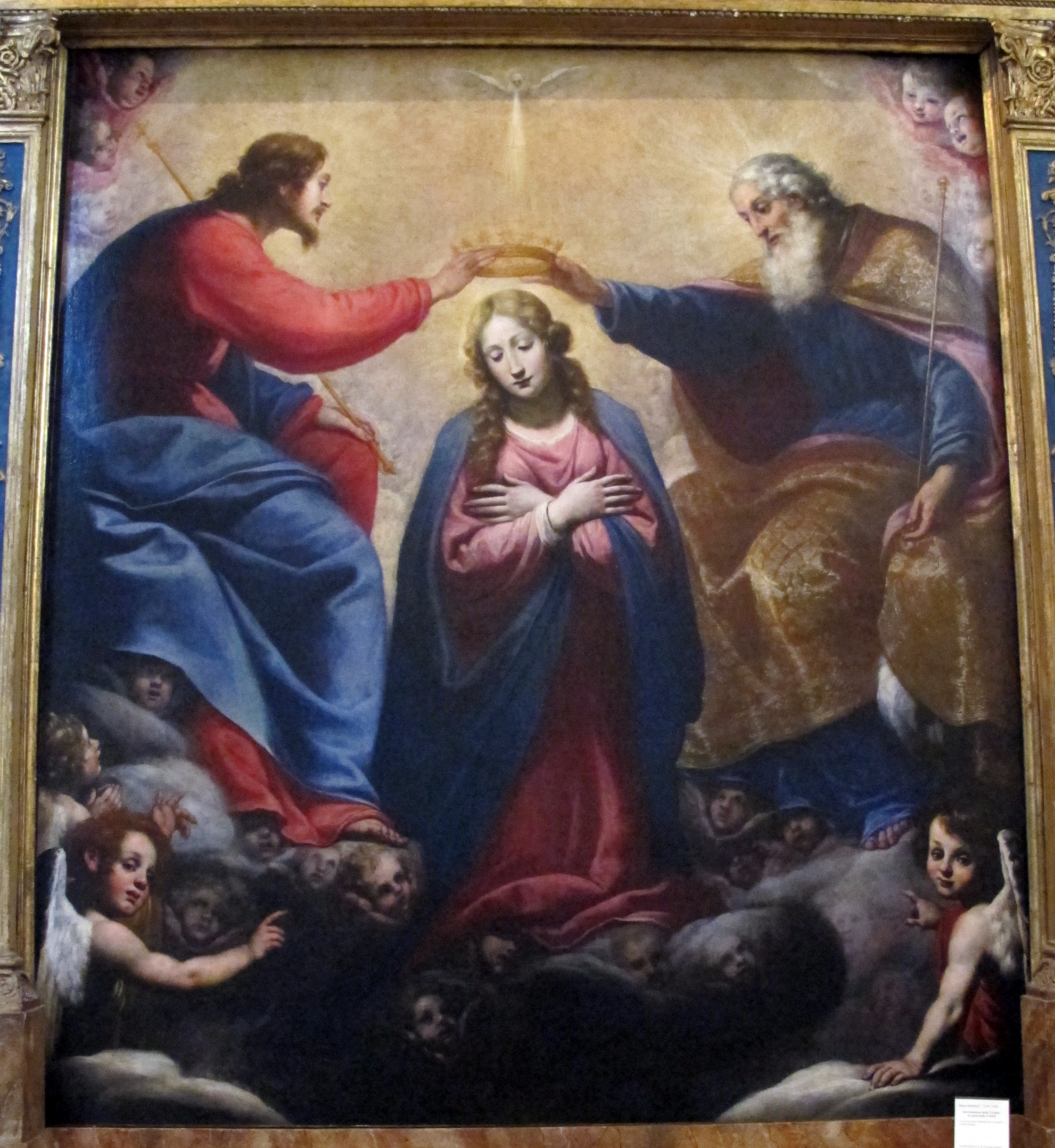 Santa Maria Maddalena de' Pazzi, Firenze